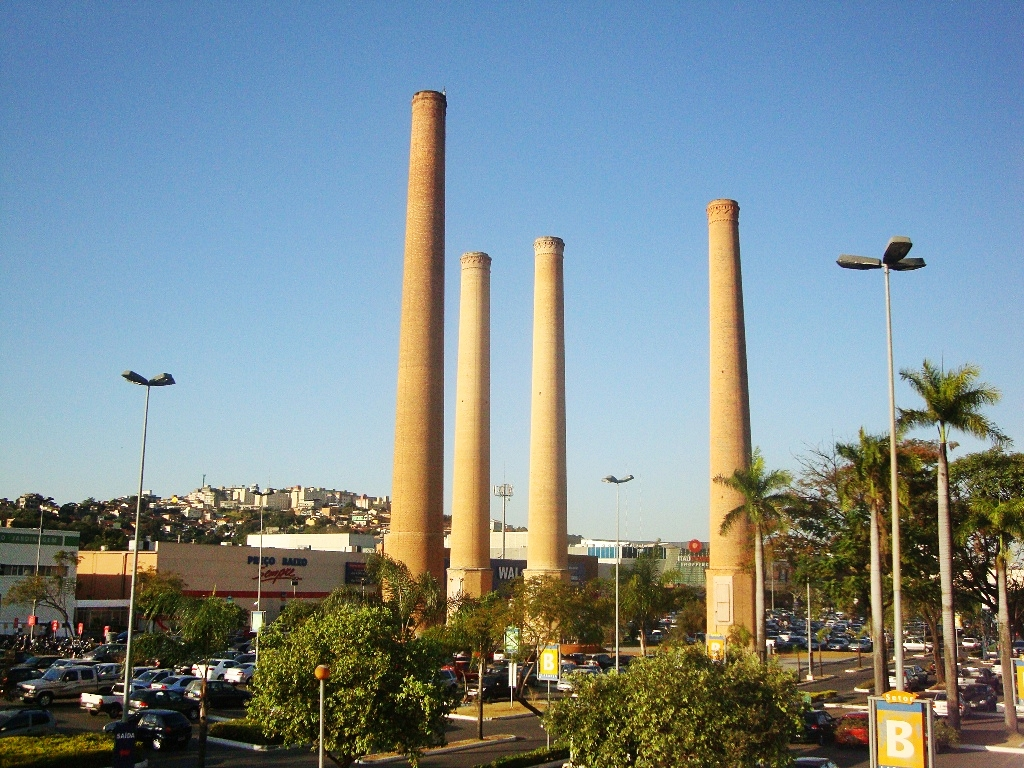 Itaú Power Shopping em Contagem (Minas Gerais, Brasil).